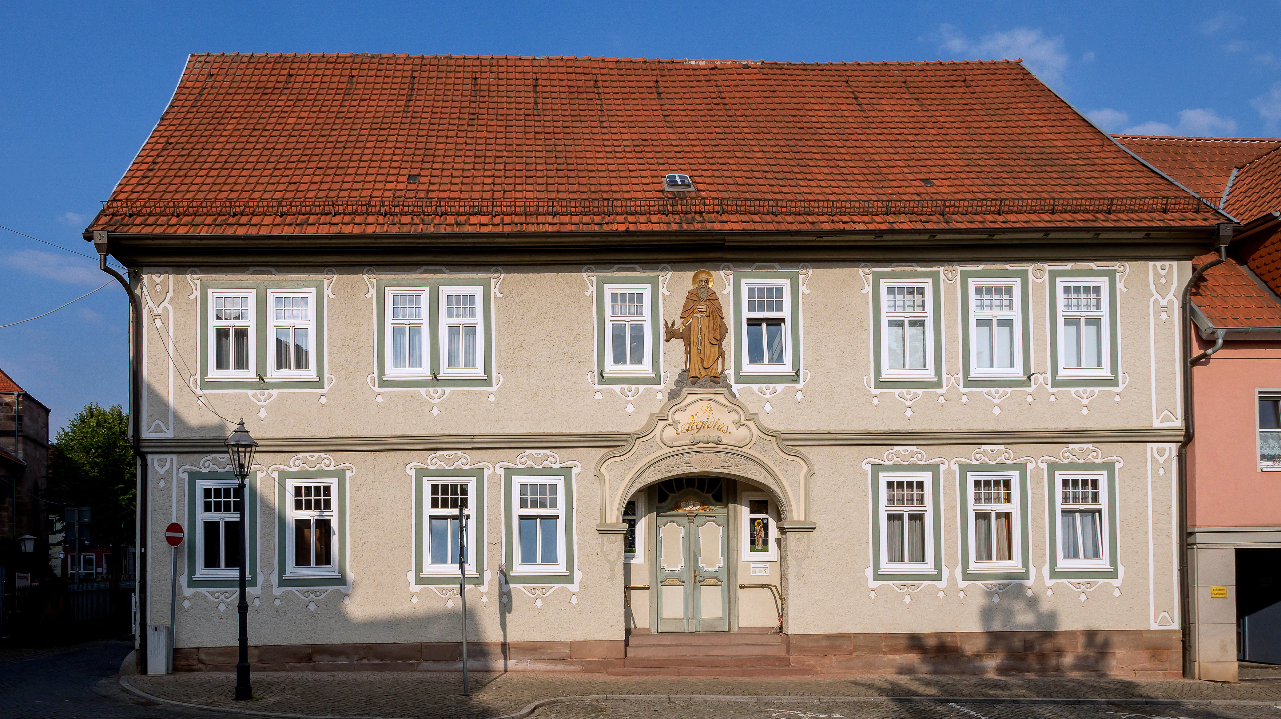 Heilbad Heiligenstadt Marktplatz 5 Pfarrhaus Ausstattung Figur 2